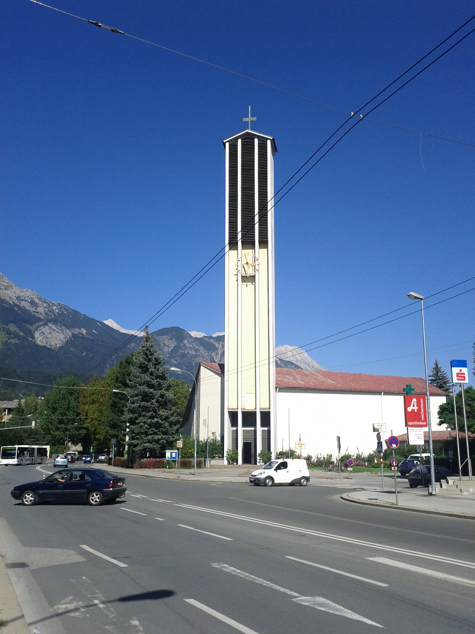 Landesgedächtniskirche hl. Paulus mit Pfarrhaus